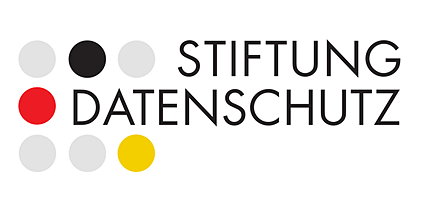 Logo von